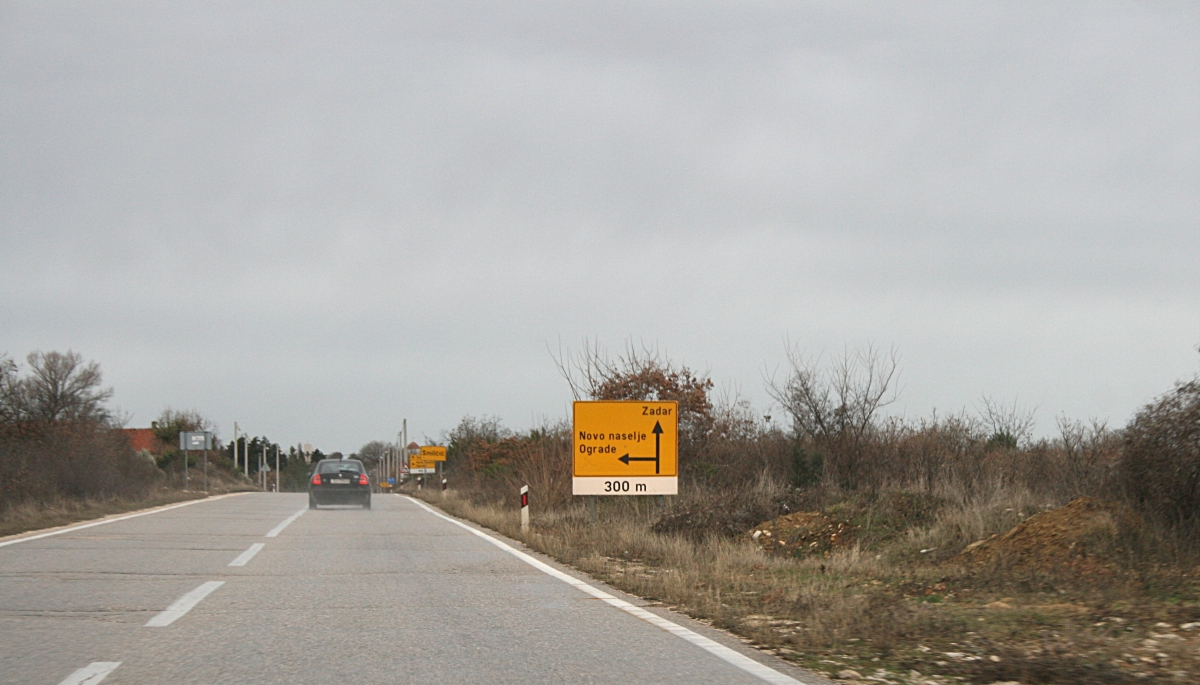 Zagreb_Split